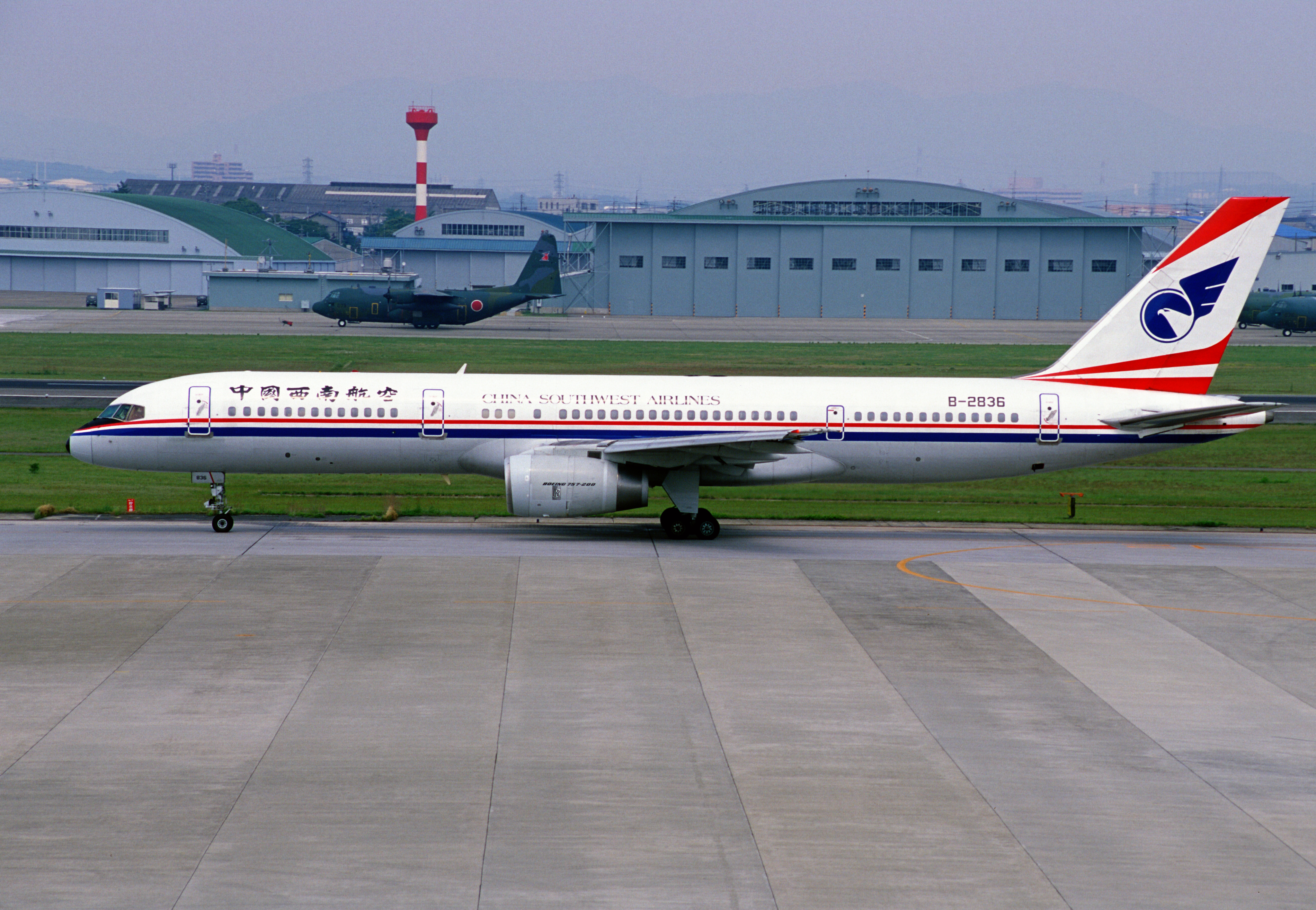 CHINA SOUTHWEST AIRLINES Boeing 757-2Z0 (B-2836/27258/595)